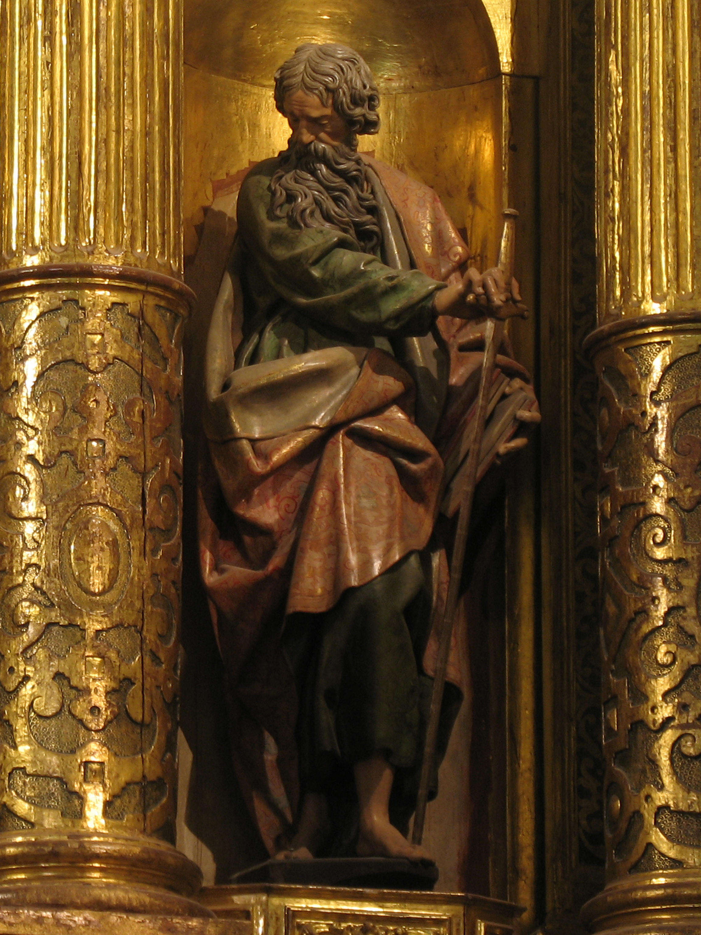 Retablo mayor. Iglesia de San Miguel y San Julián (Valladolid)